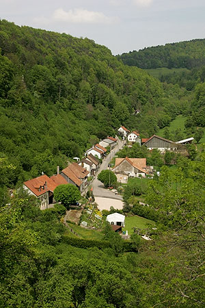 Pleujouse in der Ajoie